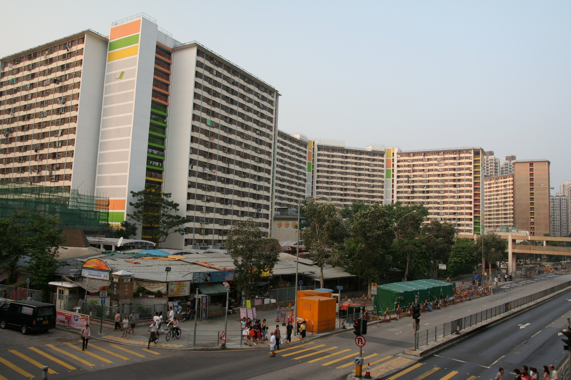 Sha Tin 沙角邨 Sha Kok Estate